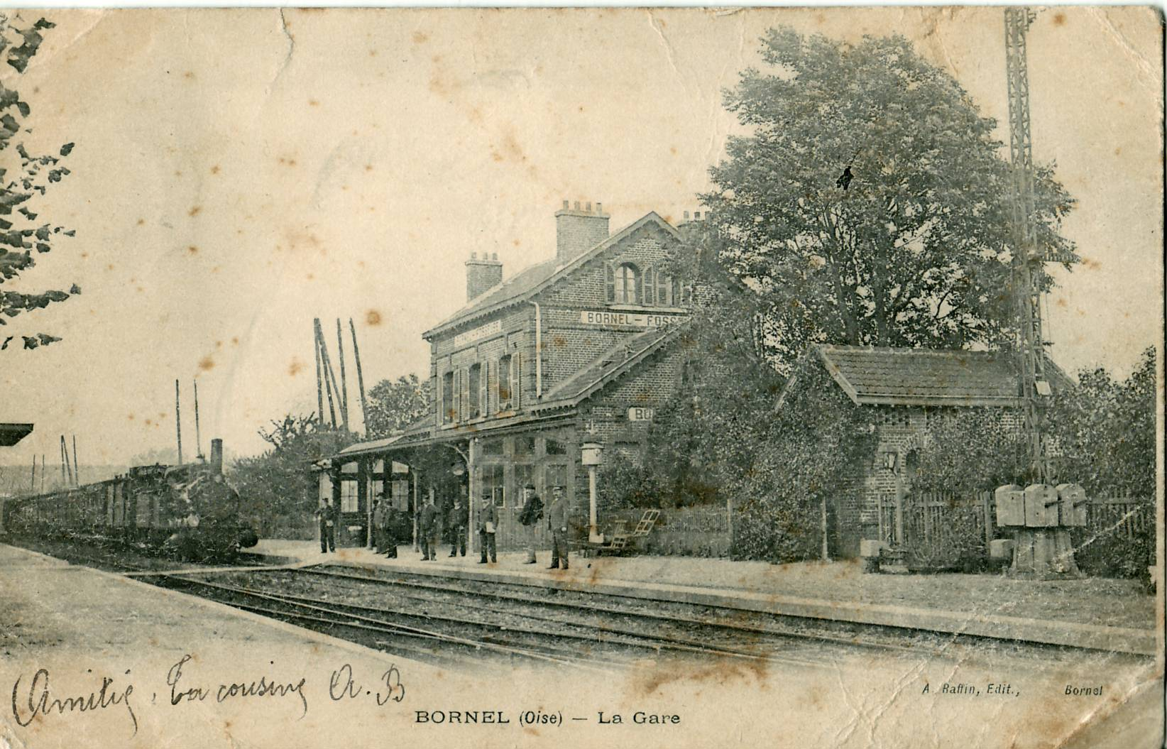 Carte postale ancienne éditée par Raffin Bornel : La Gare